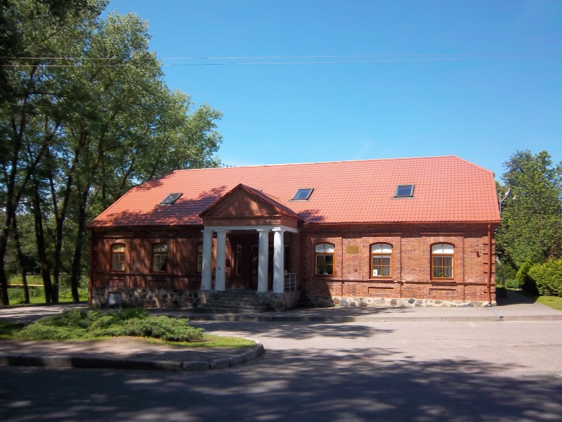 Žiežmarių kultūros namai